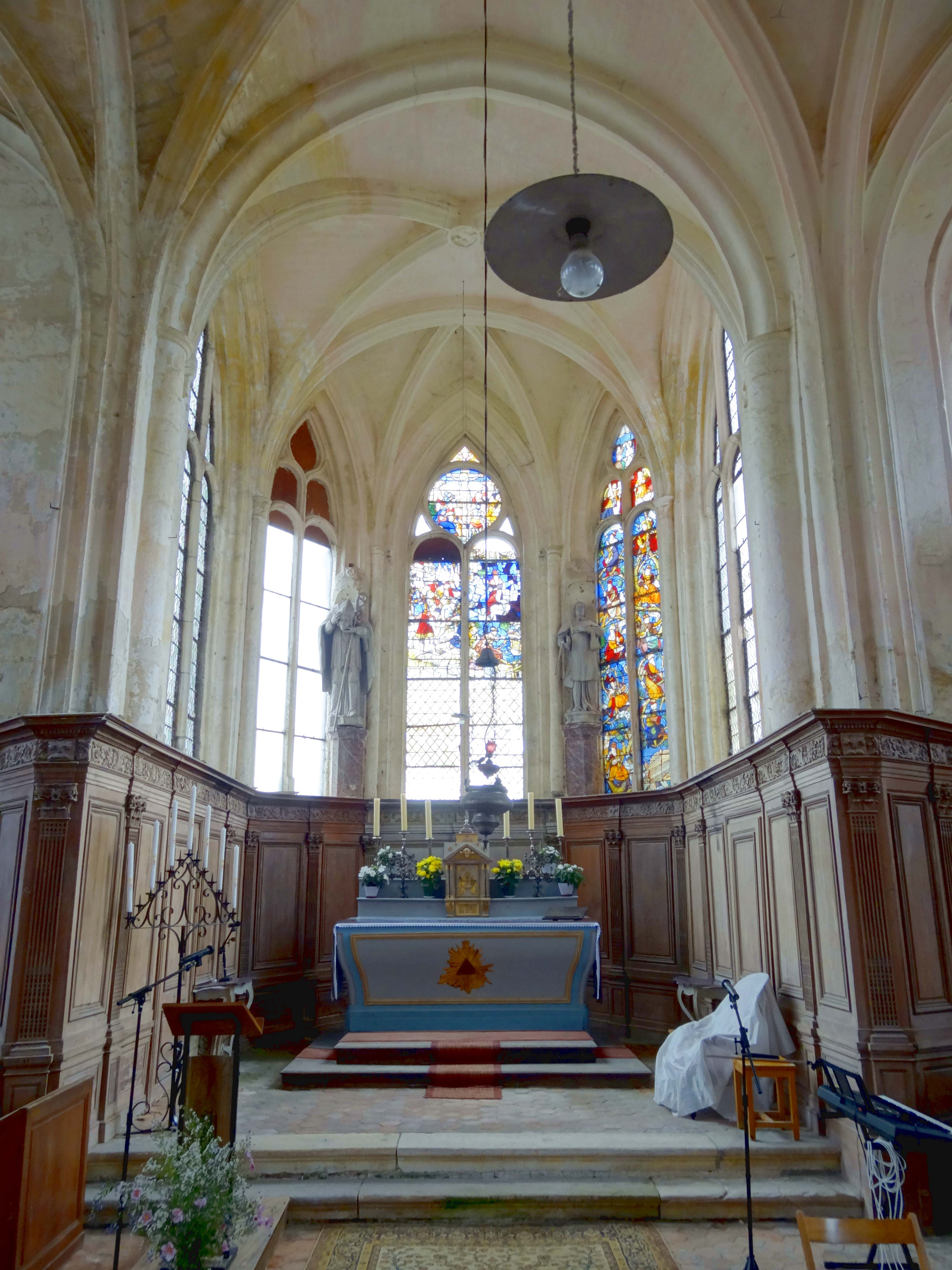 Intérieur de l'église - voir titre.